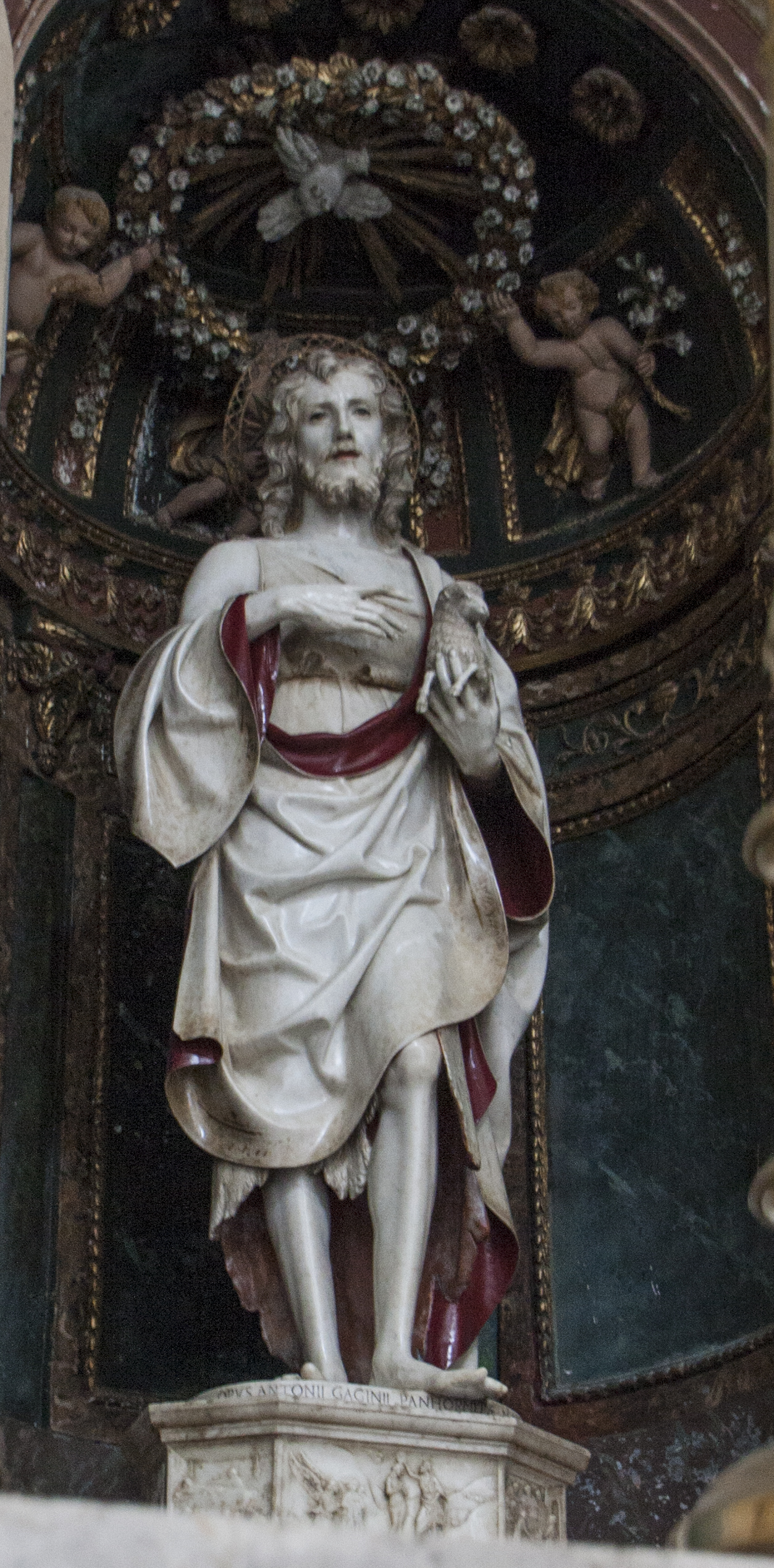 San Giovanni - Antonello Gagini 1522